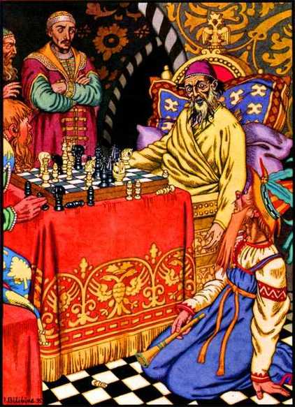 Билибин И., Смерть Ивана Грозного. 1935 г.